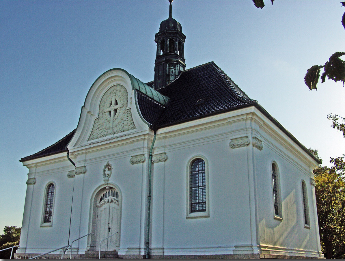 fra nordøst